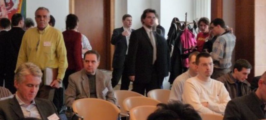 Sloboda a Solidarita - Ustanovujuci kongres 29.03:2009 Hotel Devín Bratislava Jozef Kollár ,Michal Brocka,Richard Sulík ,Ján Kvasnička ,Juraj Miškov,Jozef Mihál,Pavol Hlatký